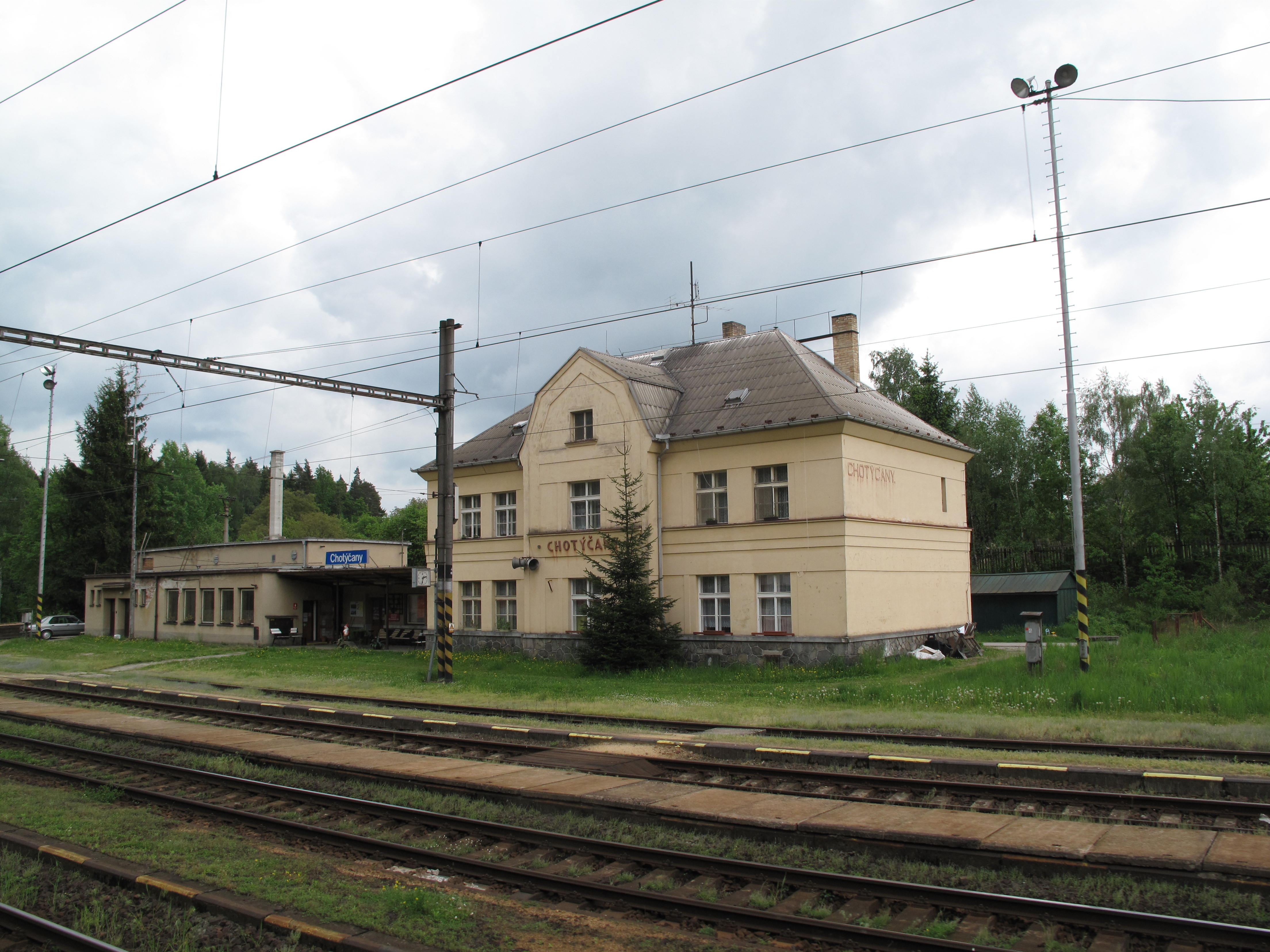 Chotýčany, železniční stanice